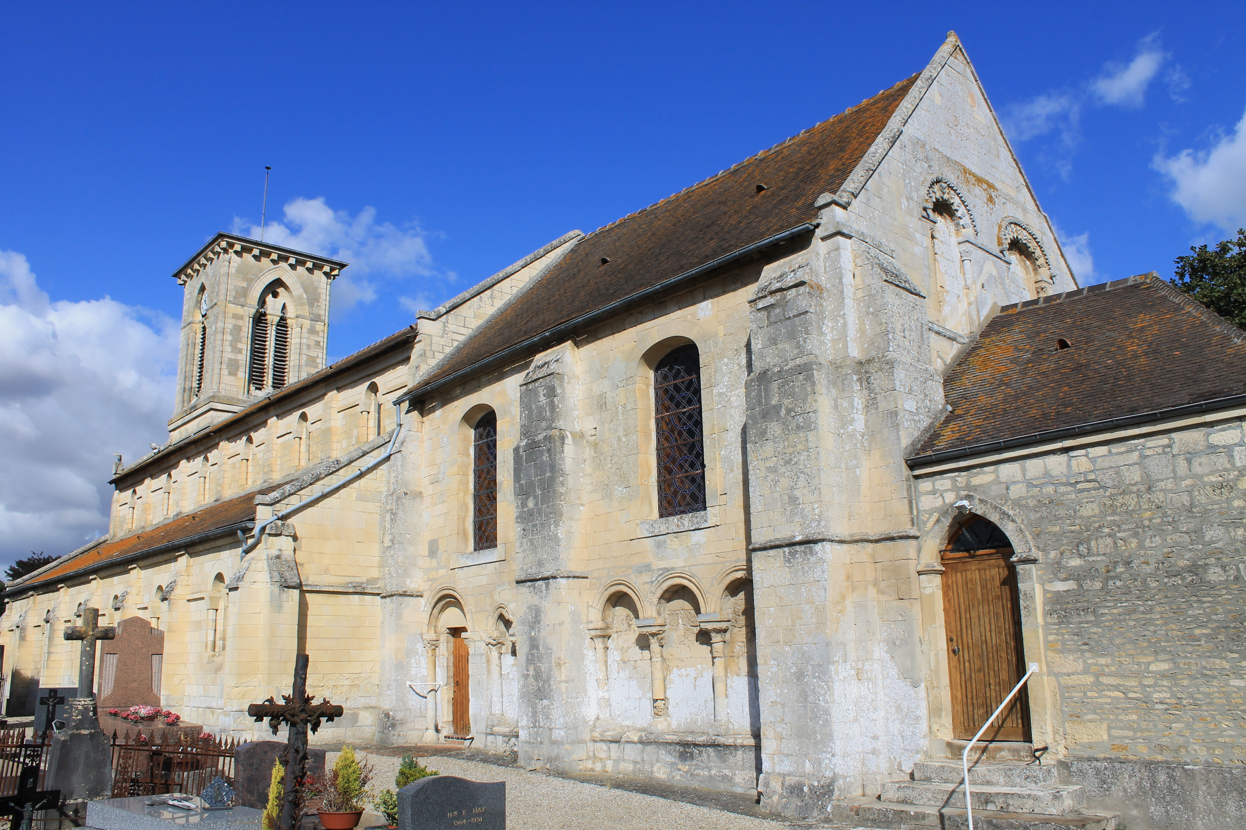 Eglise Sainte-Anne à Moult (Calvados)